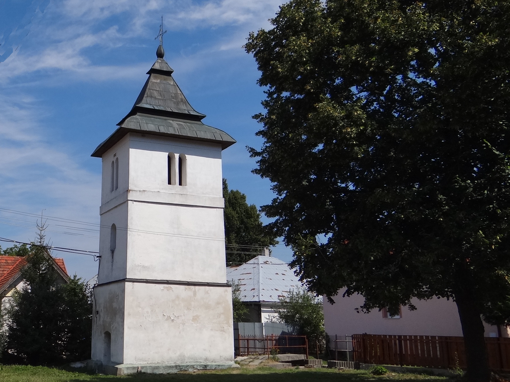 Turčianska Štiavnička